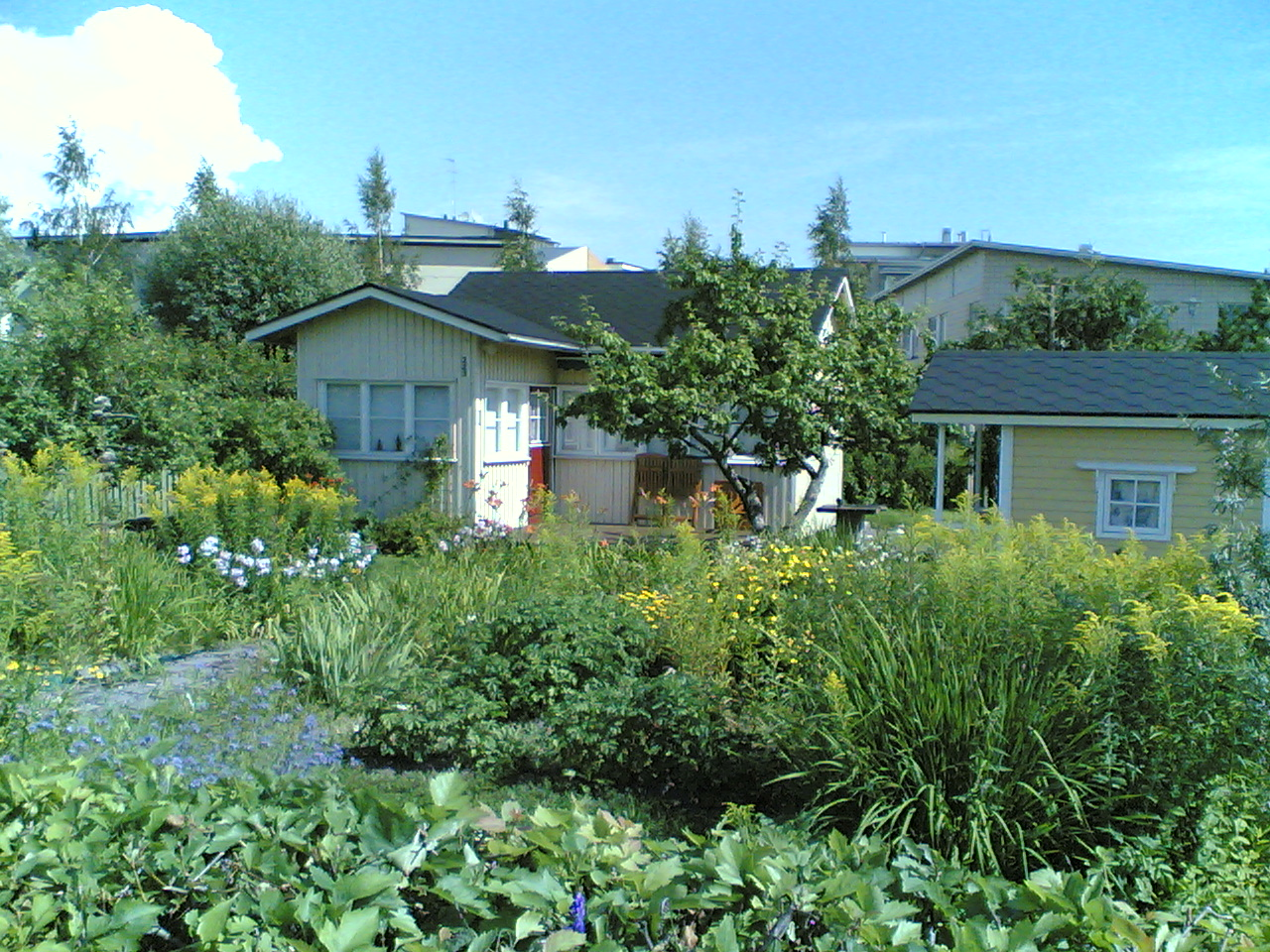 Mesimarjantie